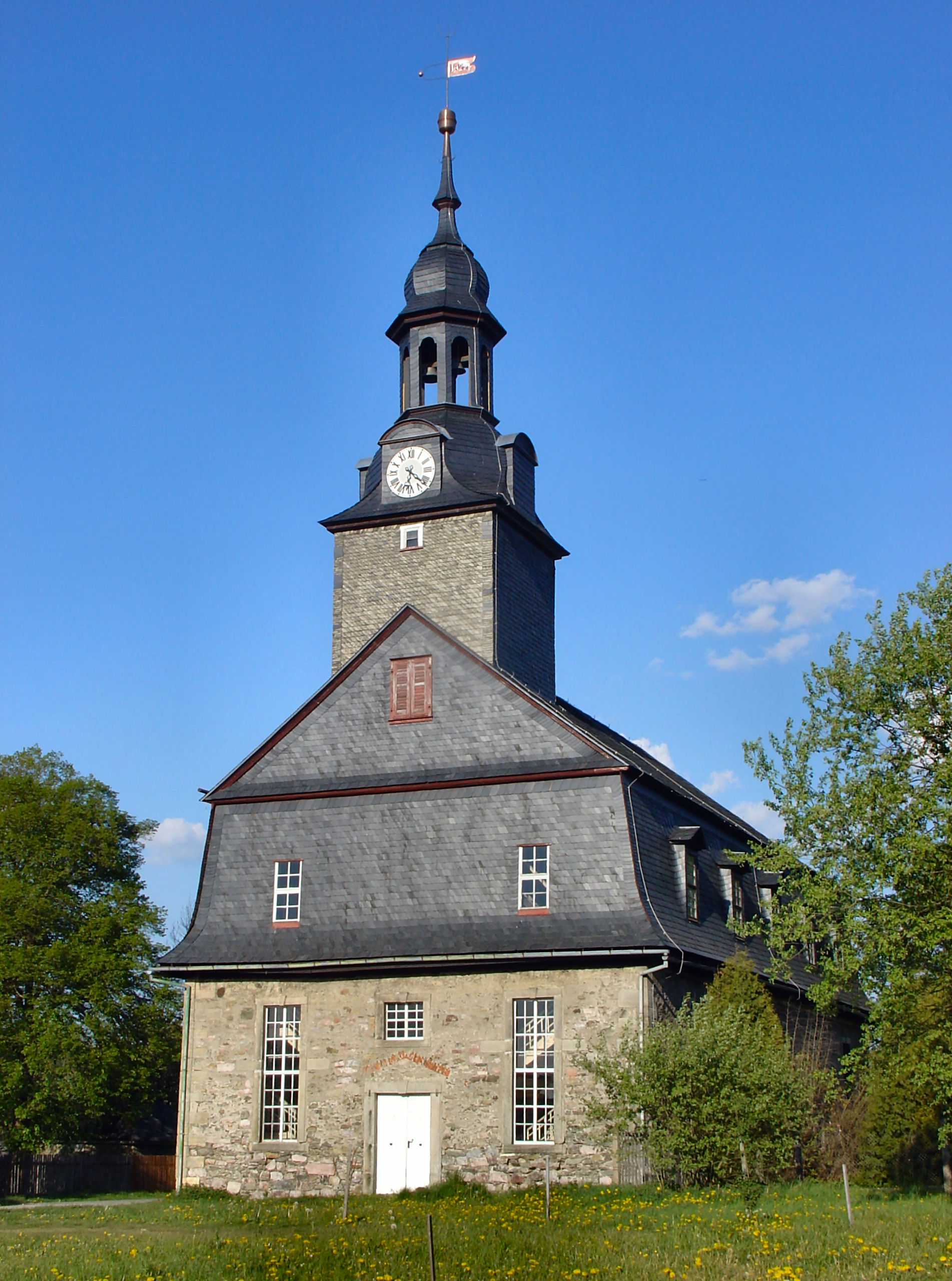 St. Anna Kirche Böhlen von Westen